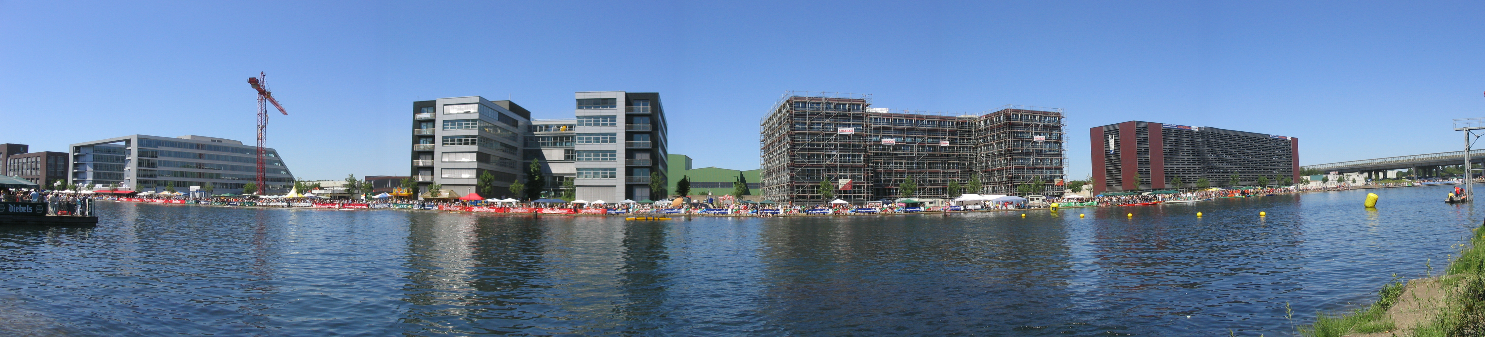 Duisburg Innenhafen (innerer Bereich); Aufnahmestandort: nahe Küppersmühle